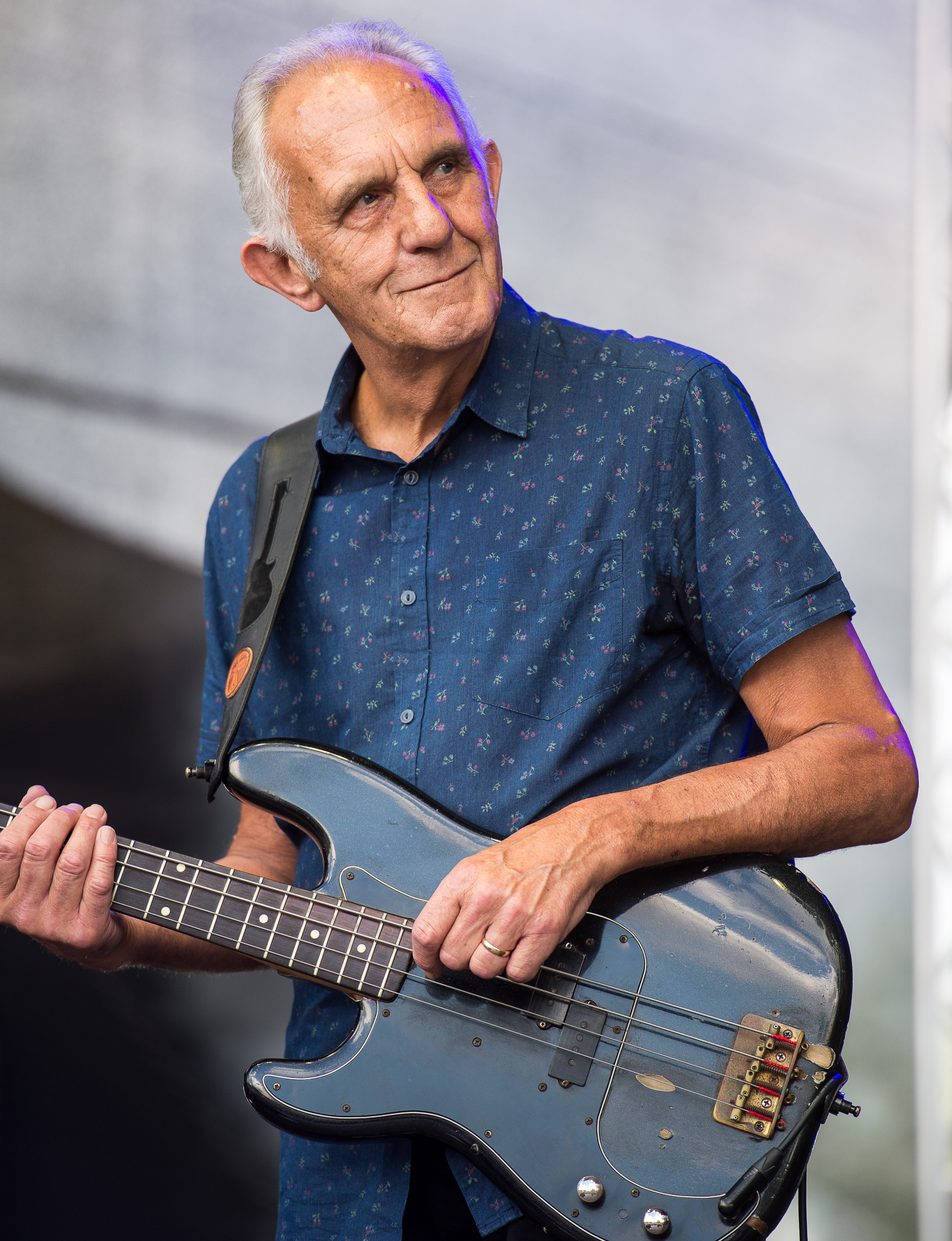 Colin Hodgkinson,Concertbüro Franken,Festival,Konzert,Lieder am See,Livekonzert,Livemusik,Musik,Ten Years After